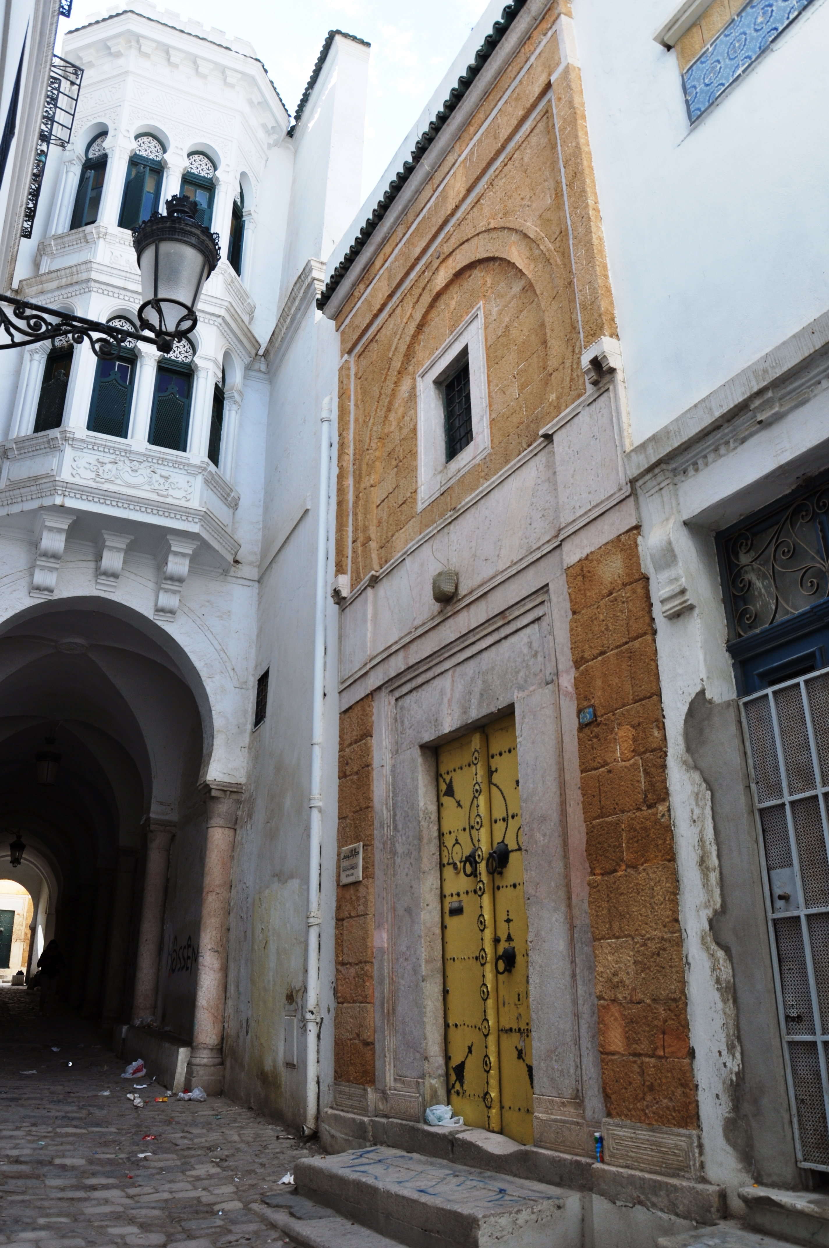 Dar Jouini